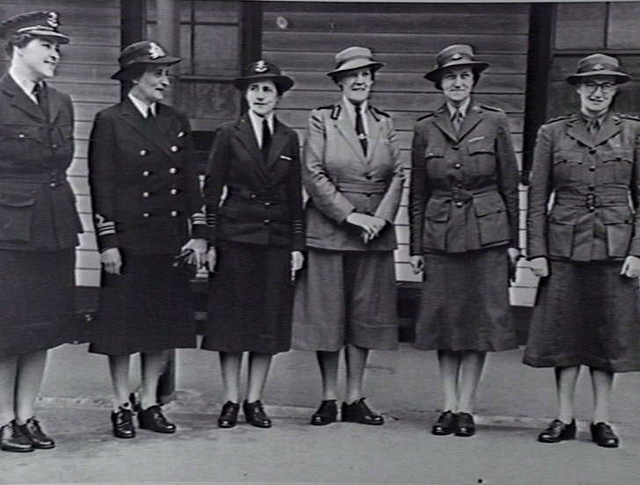 LEADERS OF THE WOMENS SERVICES WHO MET IN MELBOURNE OVER THE PREVIOUS FEW DAYS TO DISCUSS WOMEN'S SERVICE CONDITIONS. LEFT TO RIGHT: GROUP OFFICER CLARE GRANT STEVENSON, DIRECTOR OF THE WOMENS AUXILIARY AUSTRALIAN AIR FORCE (WAAAF); FIRST OFFICER ANNETTE OLDFIELD, WOMENS ROYAL AUSTRALIAN NAVAL SERVICE (WRANS); GROUP OFFICER LANG, ROYAL AUSTRALIAN AIR FORCE NURSING SERVICE; MATRON J. SINCLAIR WOOD, MATRON-IN-CHIEF AUSTRALIAN ARMY NURSING SERVICE; LIEUTENANT COLONEL (LT COL) SYBIL H. IRVING, CONTROLLER AUSTRALIAN WOMEN'S ARMY SERVICE; LT COL K. BEST, CONTROLLER, VOLUNTARY AID DETACHMENT (VAD).